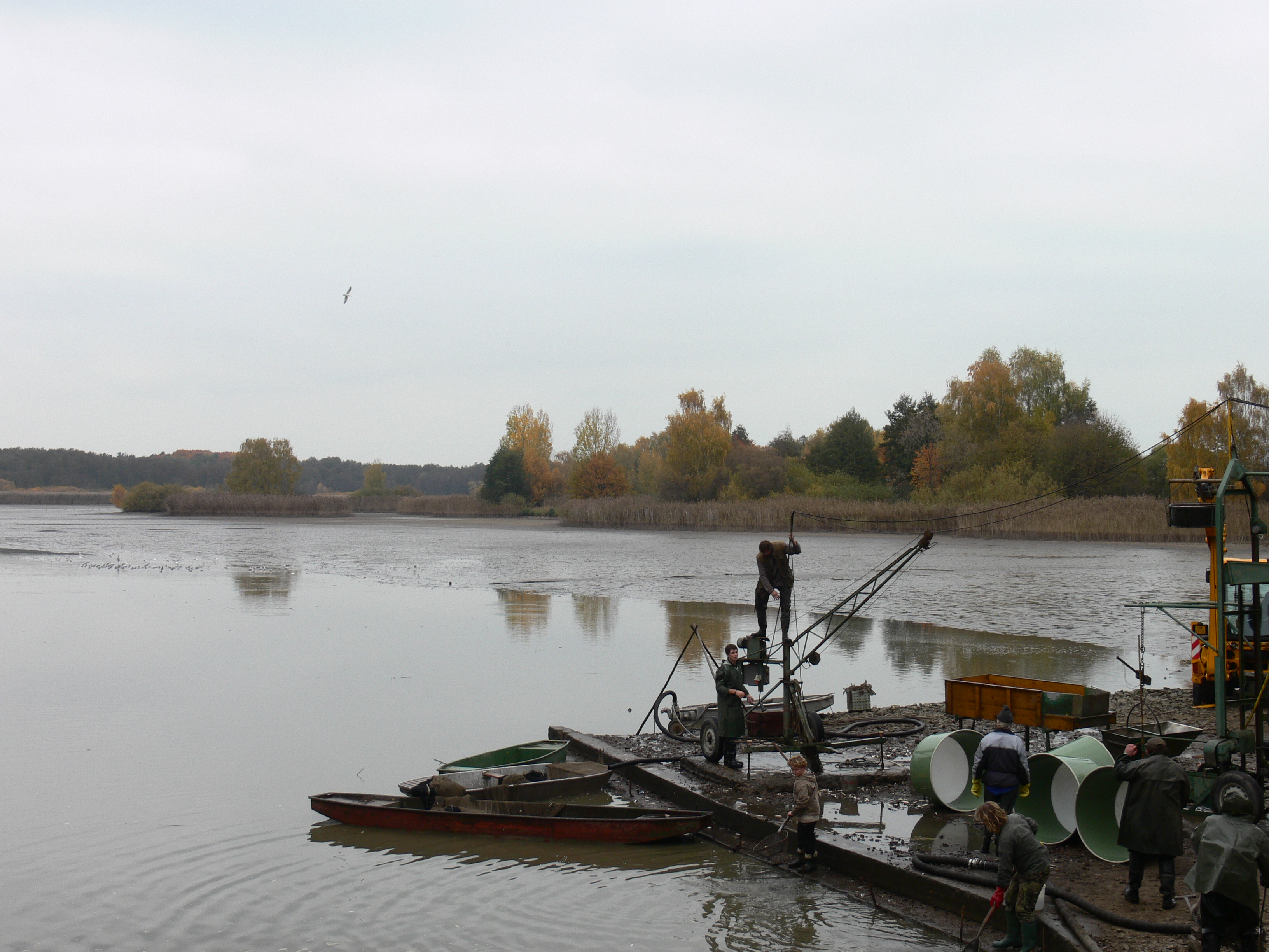 fotografie výlovů rybníka